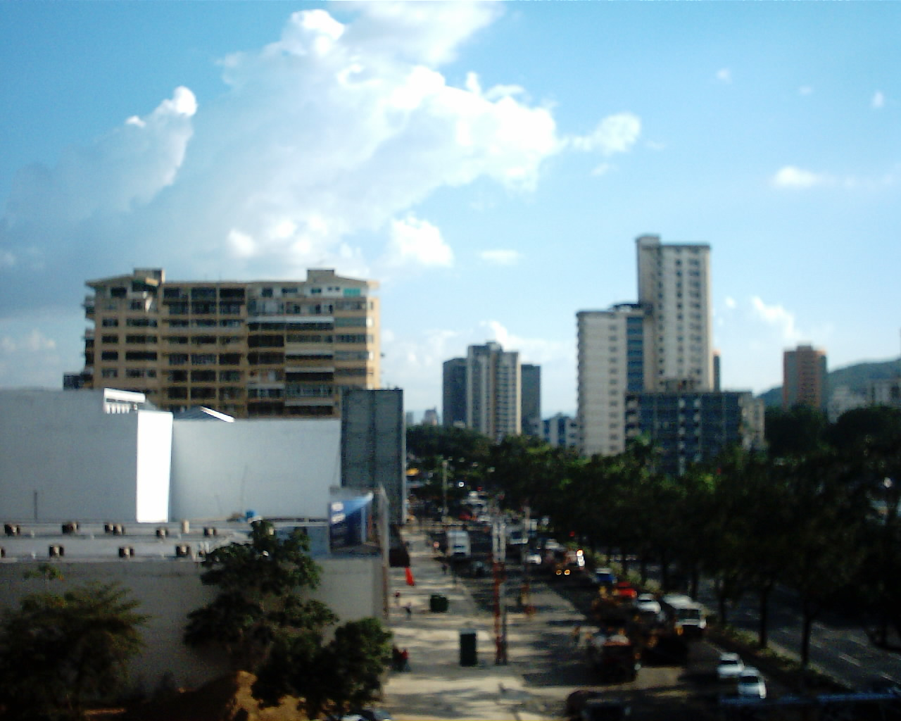 Imagen de la av. Bolívar Norte en la ciudad de Valencia, Venezuela. Sector Viñedo.